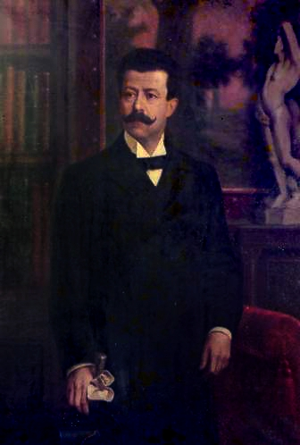 António Leão Tavares Festas, óleo por José de Almeida e Silva, Viseu, 1900. António Leão Tavares Festas, oil painting by José de Almeida e Silva, Viseu, 1900.